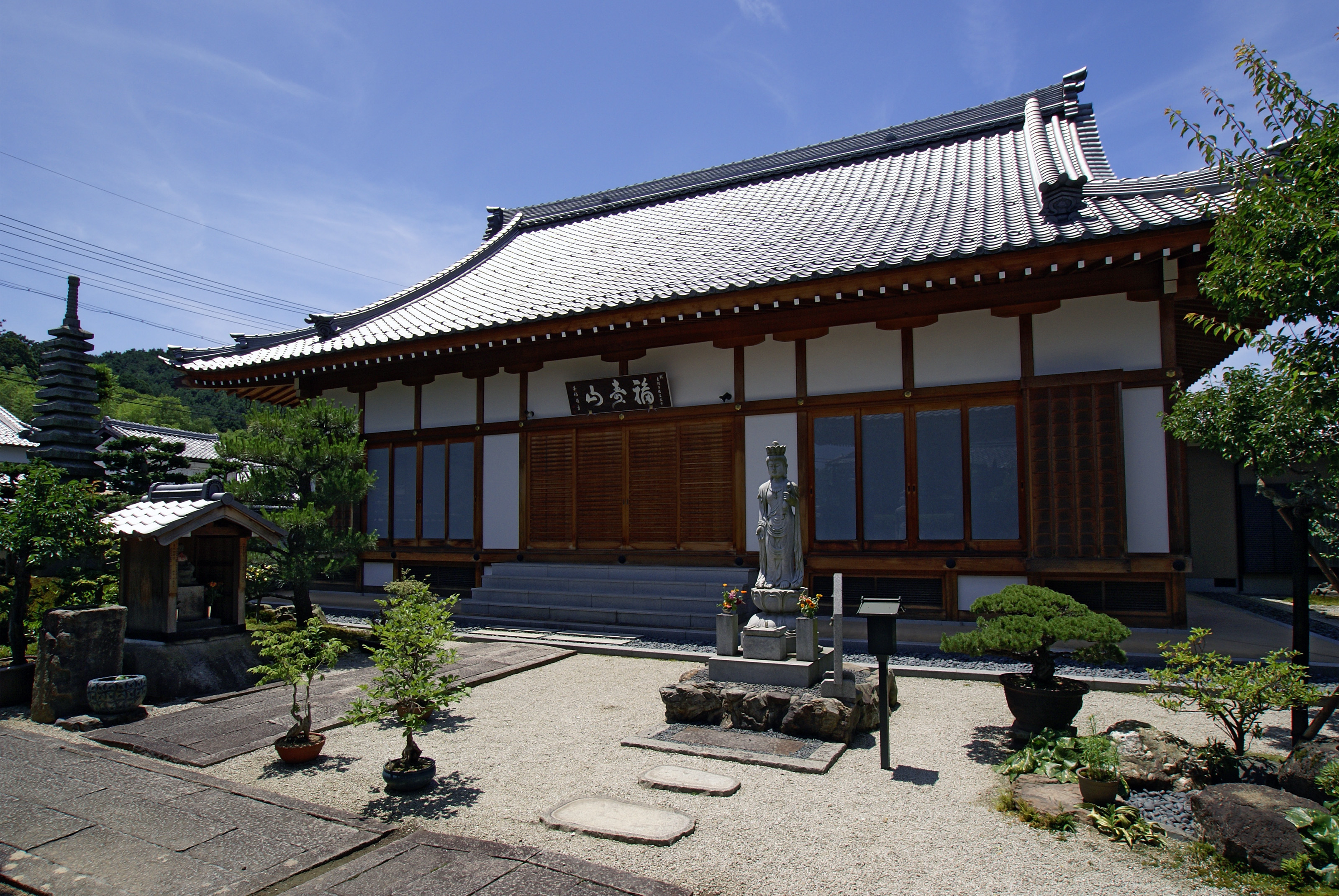 Kongoji in Kameoka, Kyoto prefecture, Japan